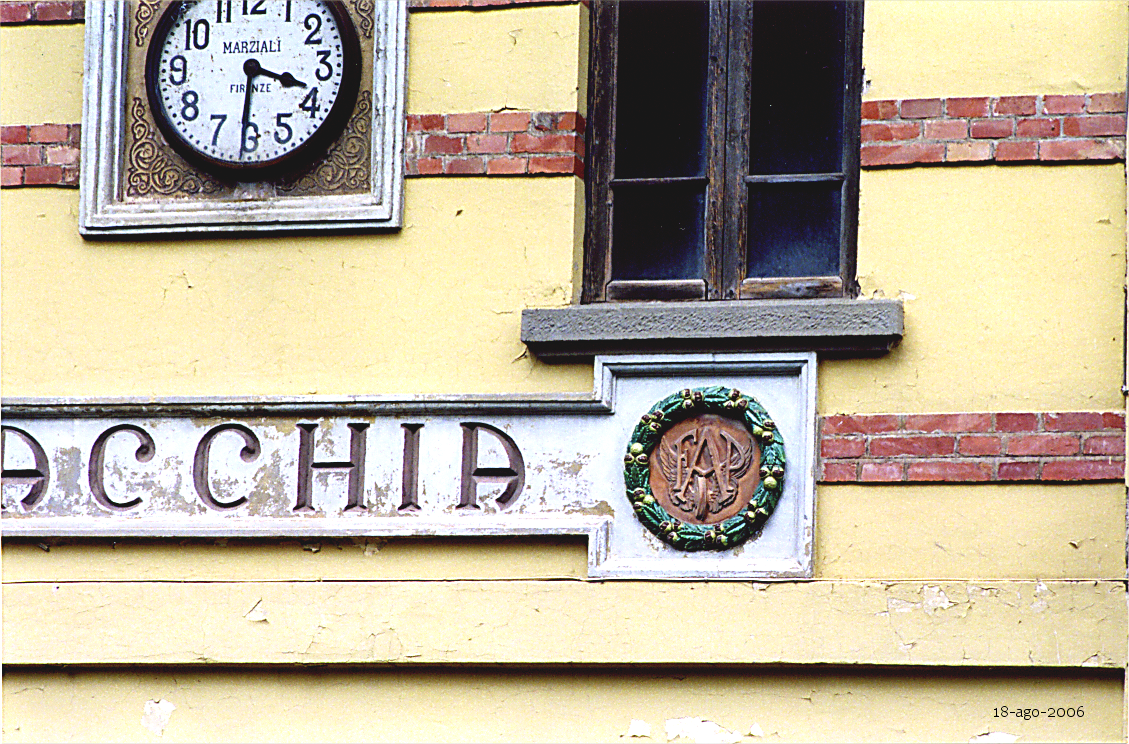 18 agosto 2006, Pracchia. Particolare dello stemma della Società ferroviaria FAP posto sulla facciata dell'edificio della stazione. Mia foto con clone Pentax reflex, mediotele 135 mm a focale fissa, pellicola a 400 ISO.